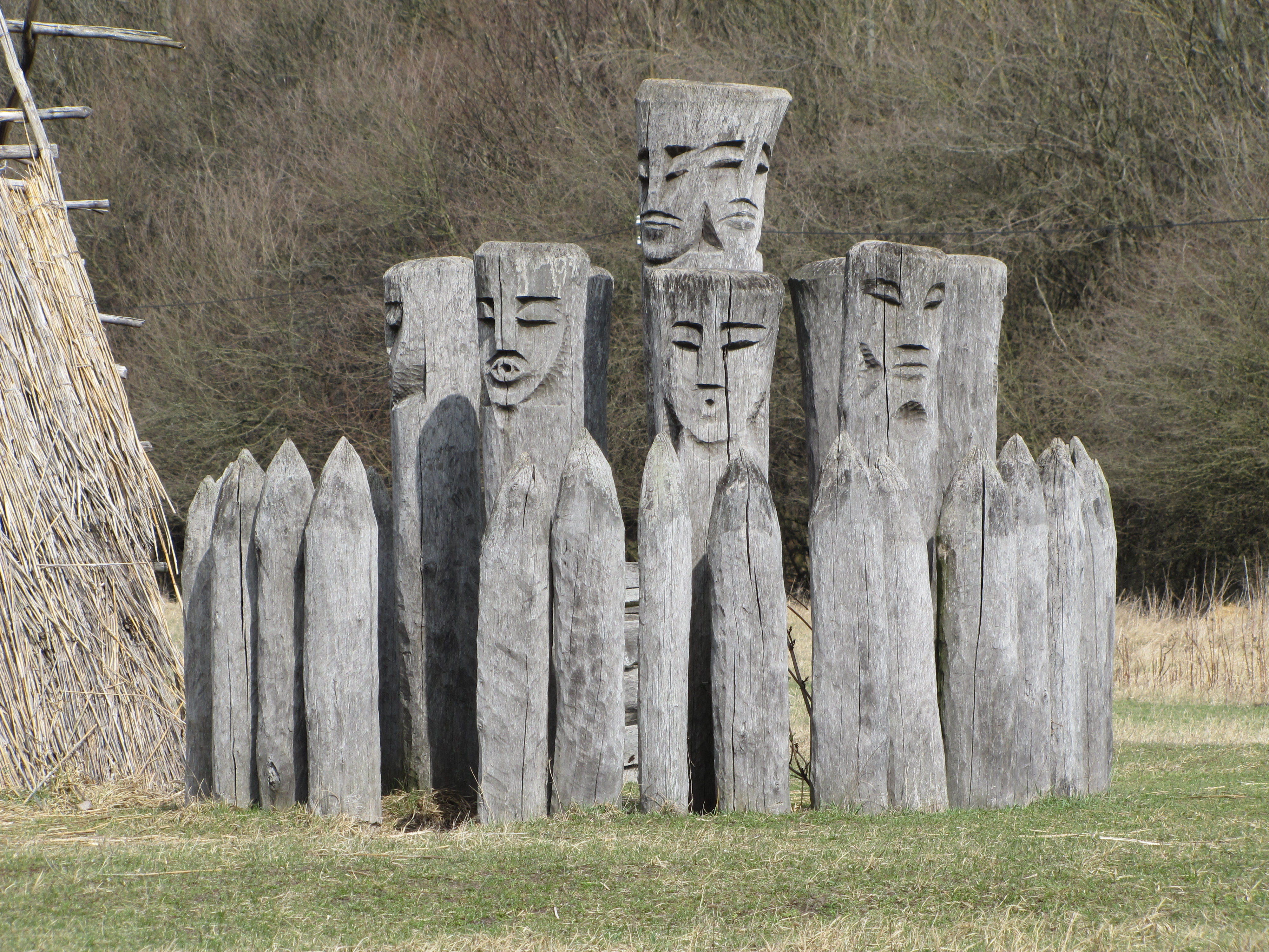 Bývalé hradiště Pohansko u Břeclavi